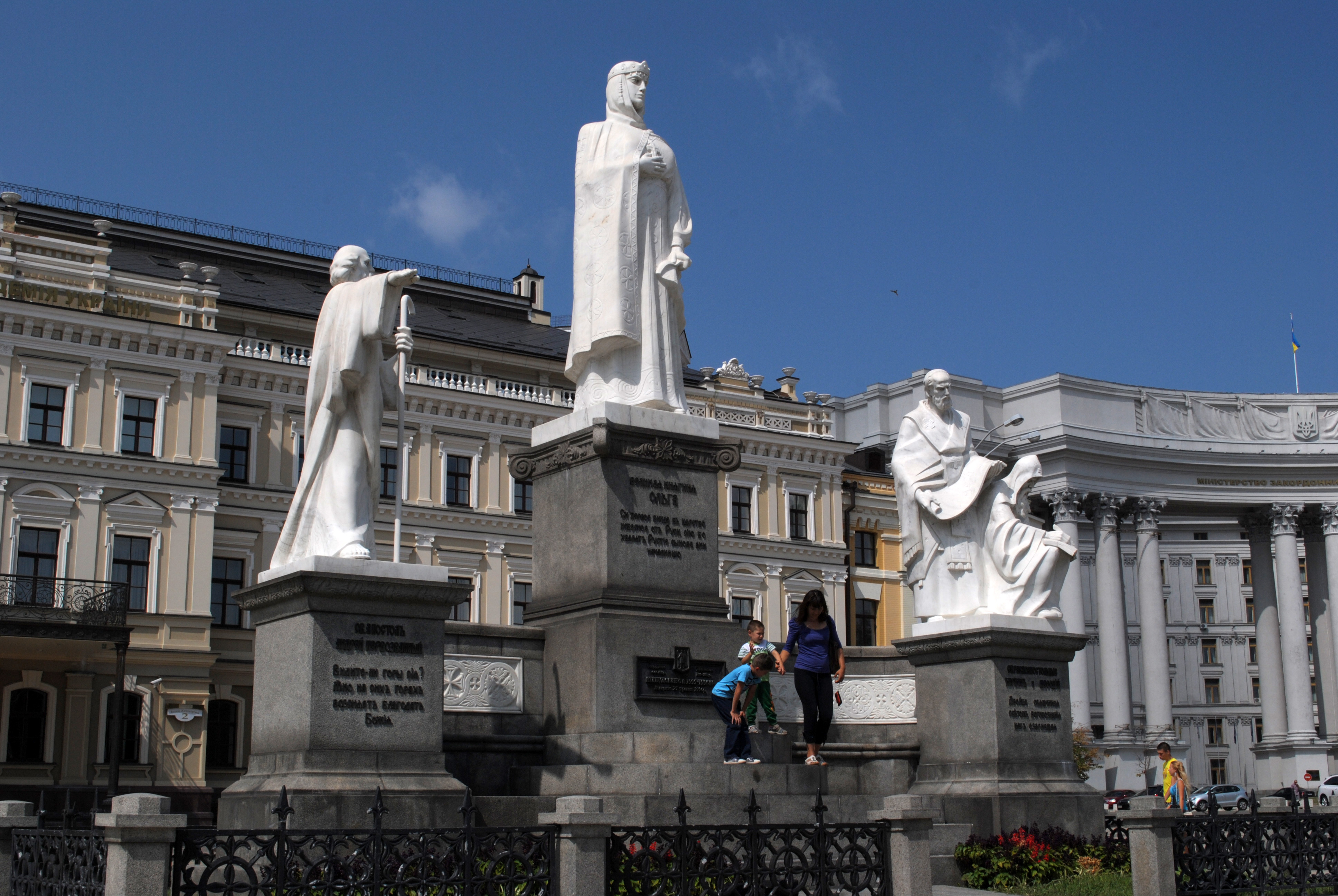 Пам'ятник княгині Ользі, святому апостолу Андрію Первозваному та просвітителям Кирилу і Мефодію, Київ, Михайлівська пл.